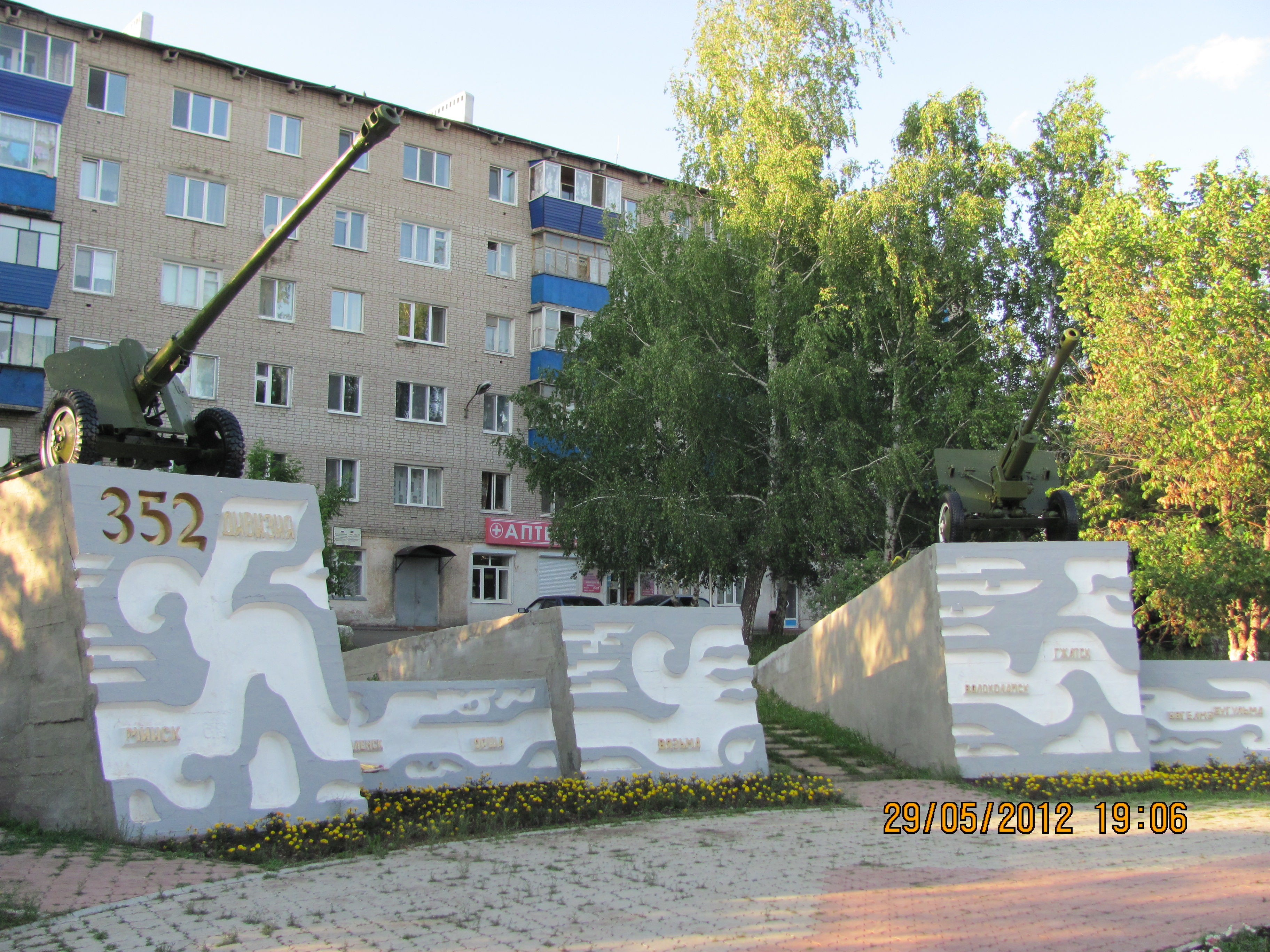 Мемориал 352я дивизия